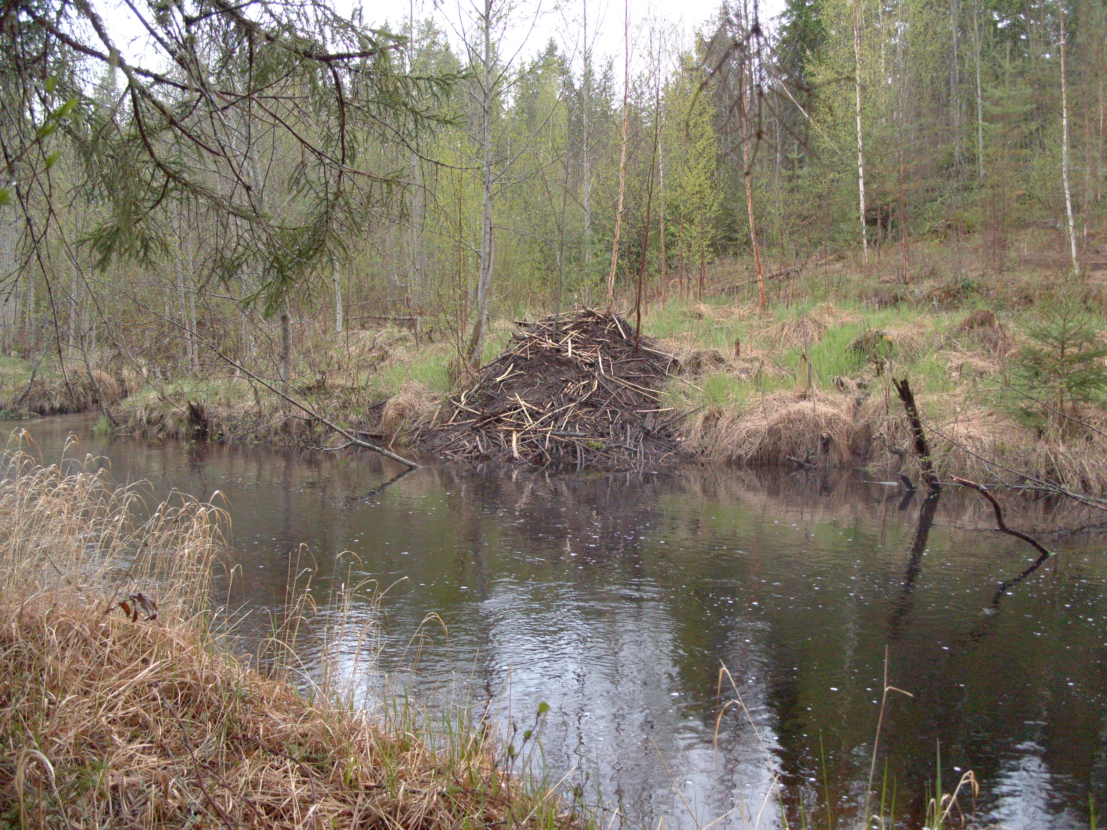 Bäverhydda